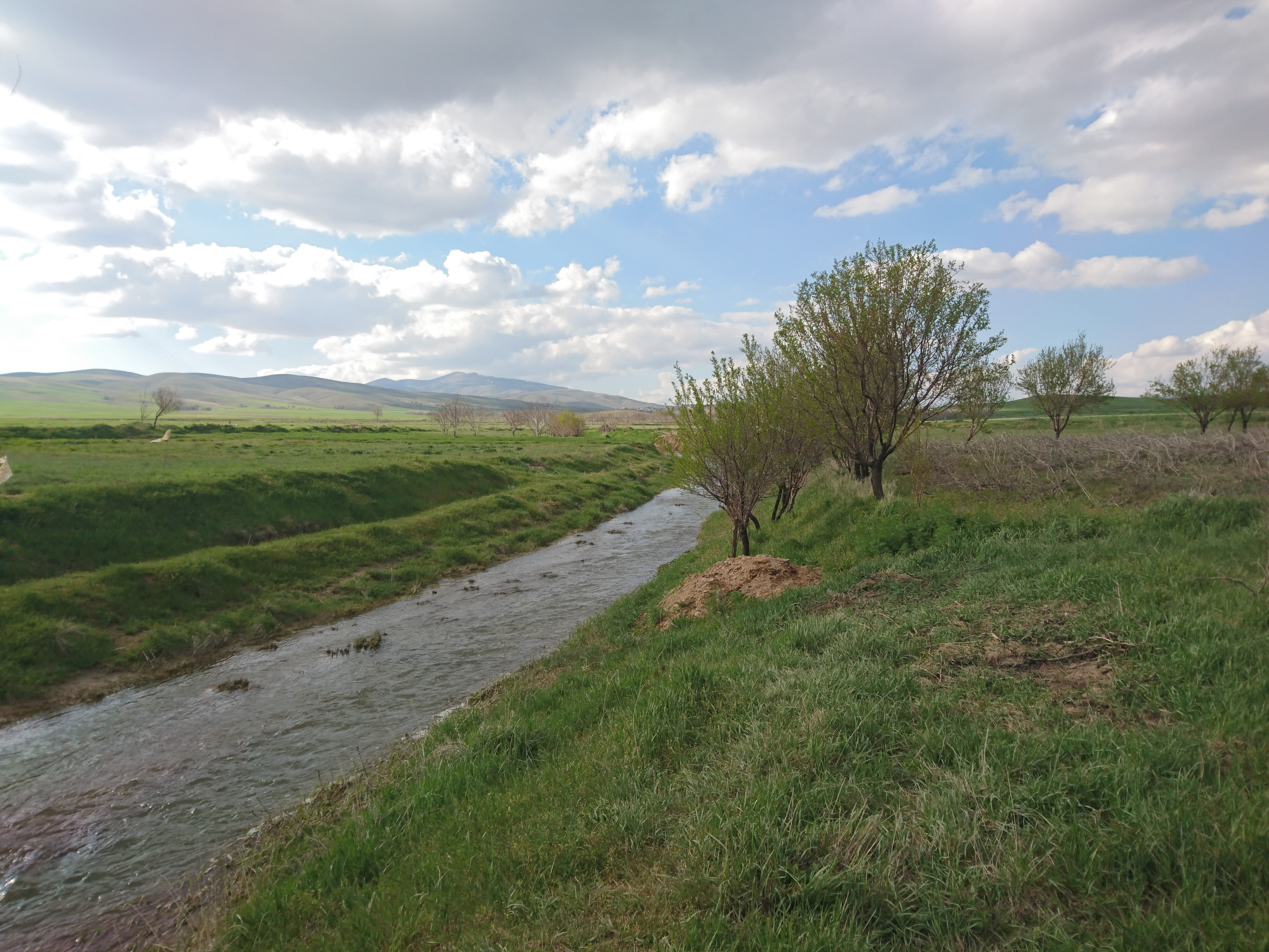 طبیعت روستای رحمان‌آباد در فصل بهار